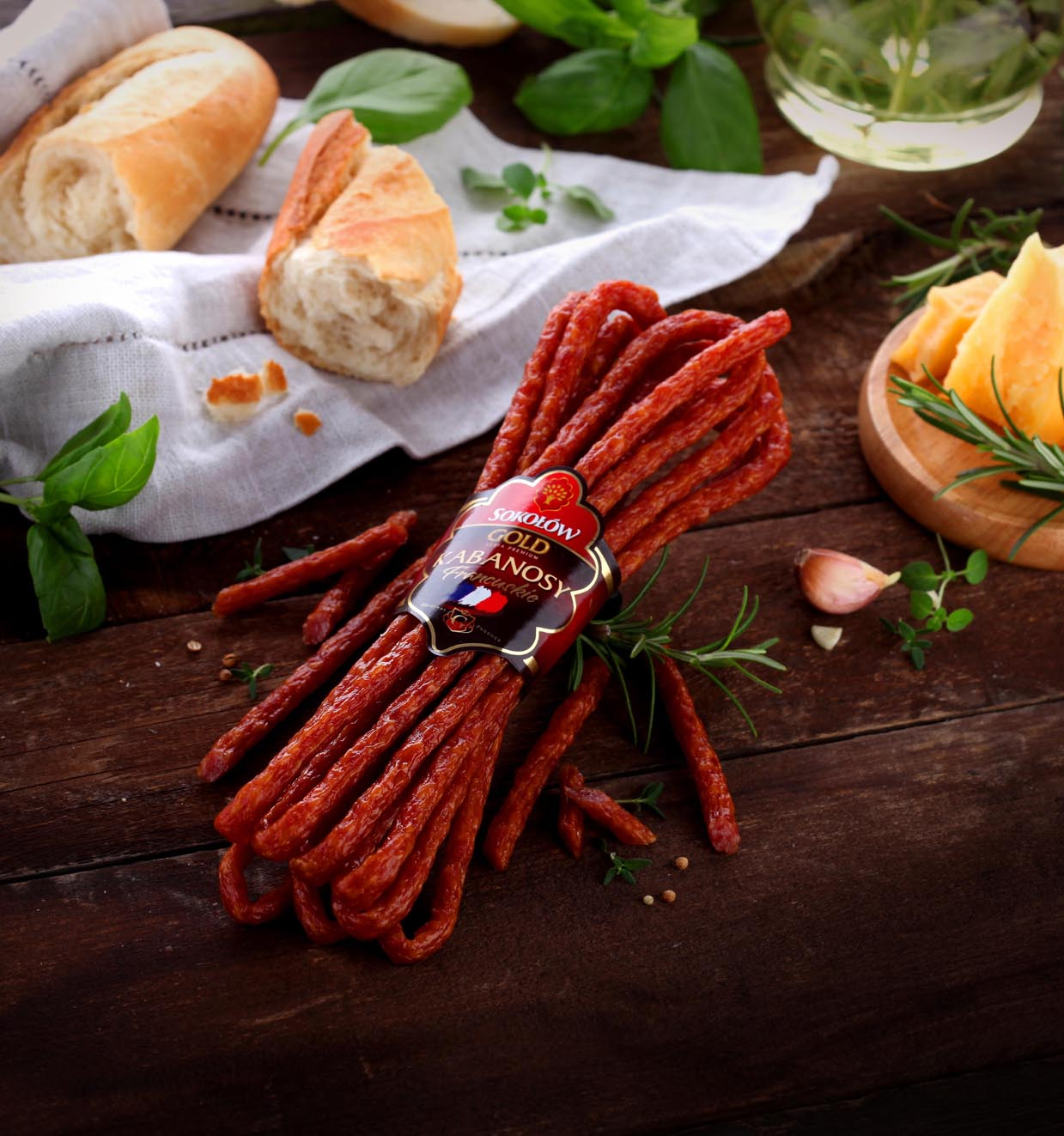 kabanosy francuskie firmy Sokołów SA